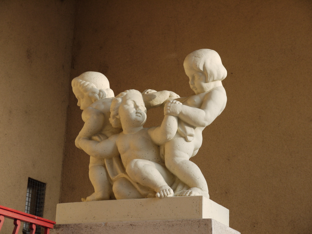 Reumannhof Plastik